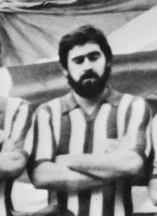 Collectie / Archief : Fotocollectie Anefo Reportage / Serie : Halve finale UEFA Cup RWD Molenbeek - Athletic de Bilbao (1977) Beschrijving : Elftalfoto Athletic de Bilbao (archief) Datum : 4 april 1977 Locatie : Bilbao, Spanje Trefwoorden : Europacup, UEFA Cup, voetbal Fotograaf : [onbekend] Auteursrechthebbende : Nationaal Archief Materiaalsoort : Negatief (zwart/wit) Nummer archiefinventaris : bekijk toegang 2.24.01.04 Bestanddeelnummer : 929-1073